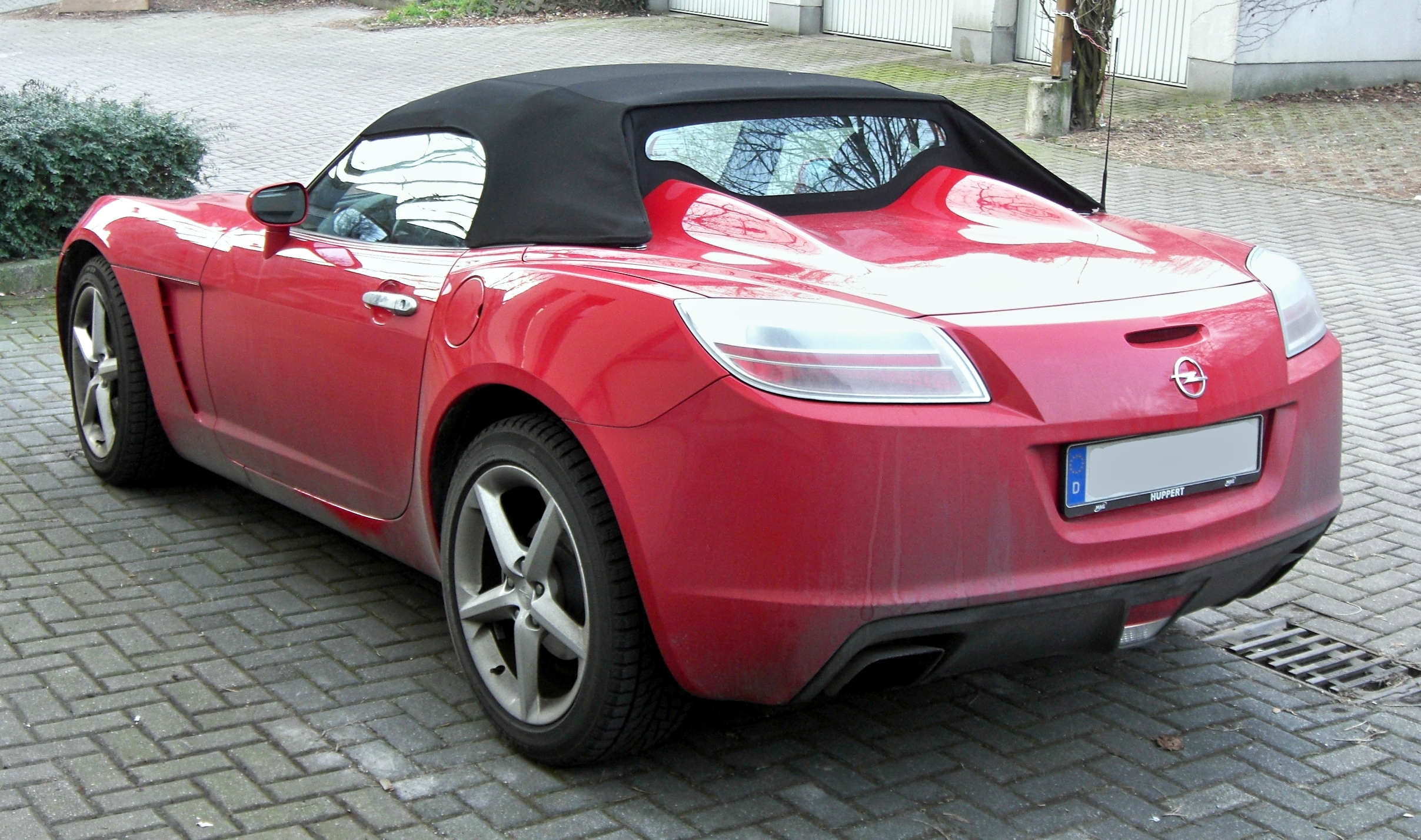 Opel GT Roadster